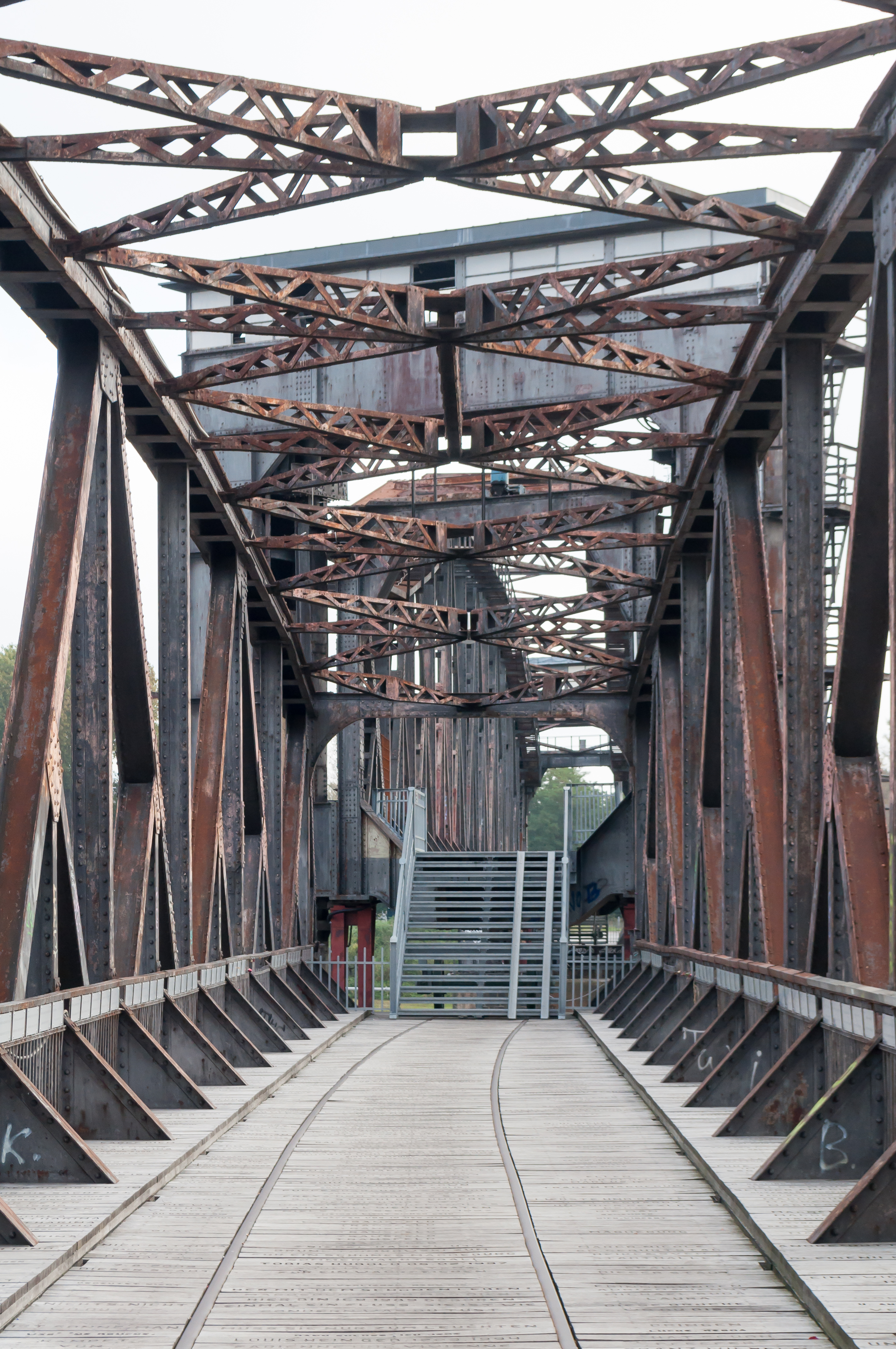 Historische Hubbrücke über die Elbe in Magdeburg - Westteil, Blick nach Nordosten. This is a photograph of an architectural monument.It is on the list of cultural monuments of Magdeburg